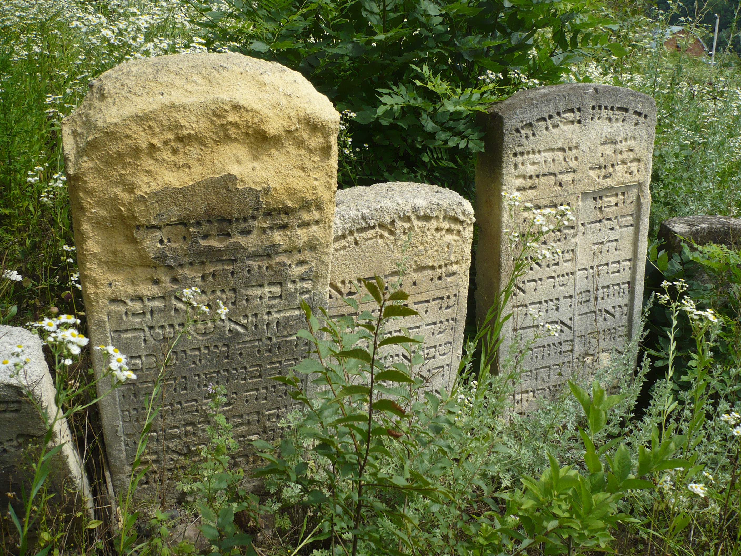 Buczacz.Kirkut